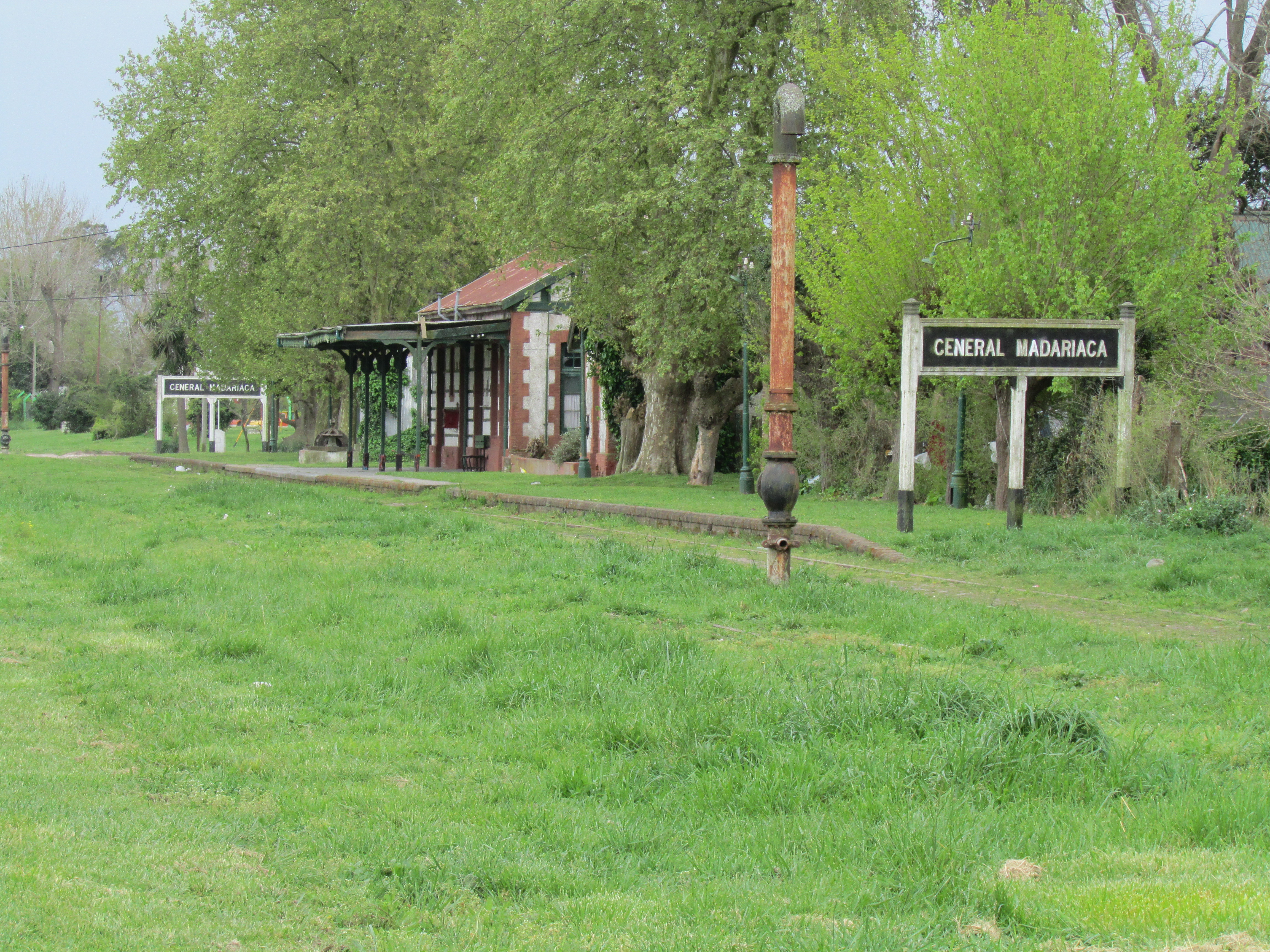 Nomencladores y edificio de la estación General Madariaga del Ferrocarril General Roca, en la ciudad del mismo nombre, provincia de Buenos Aires, Argentina.